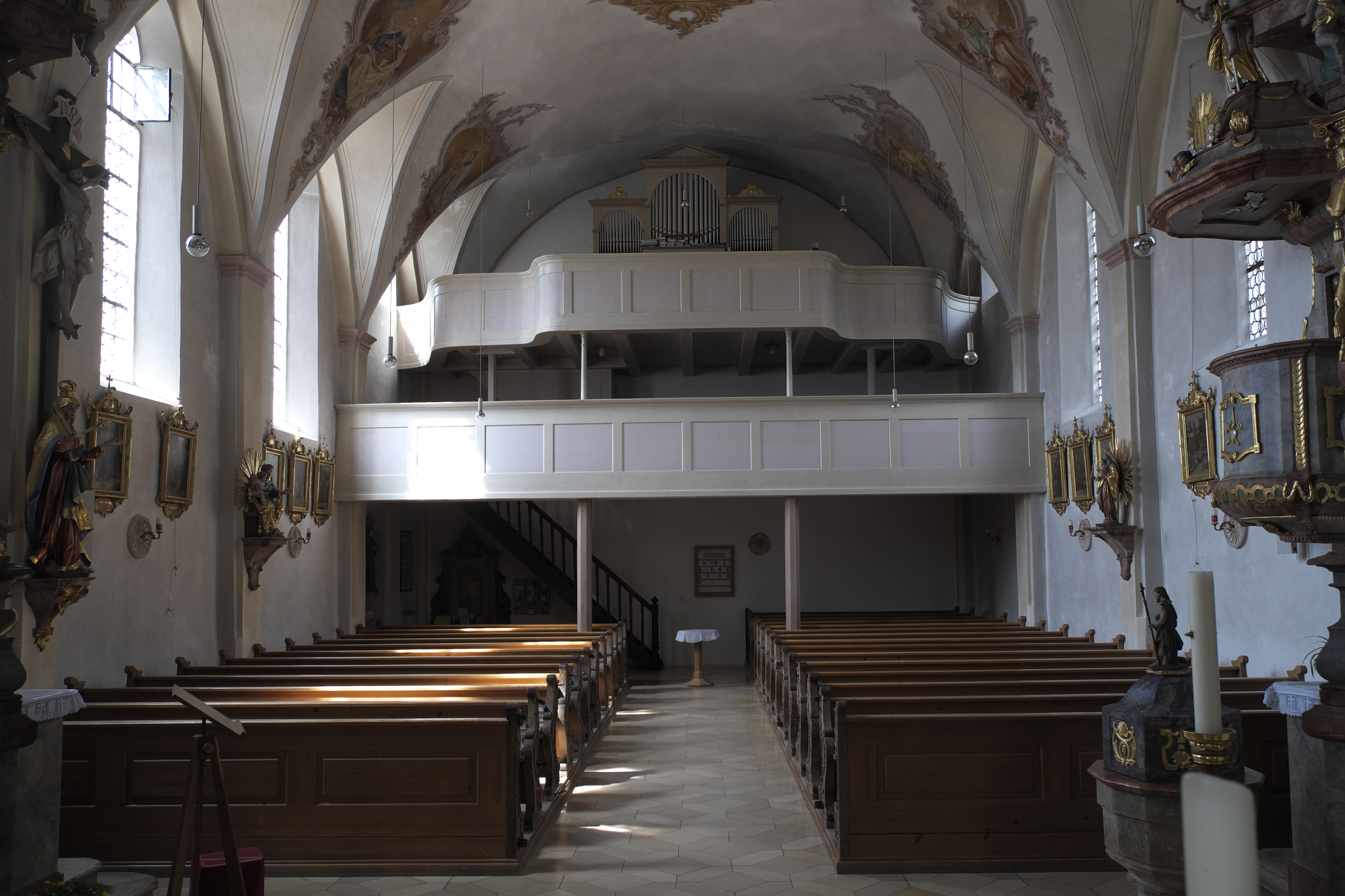 Katholische Pfarrkirche Johannes Baptist und Johannes Evangelist in Steinkirchen im Landkreis Erding (Bayern/Deutschland), Innenraum